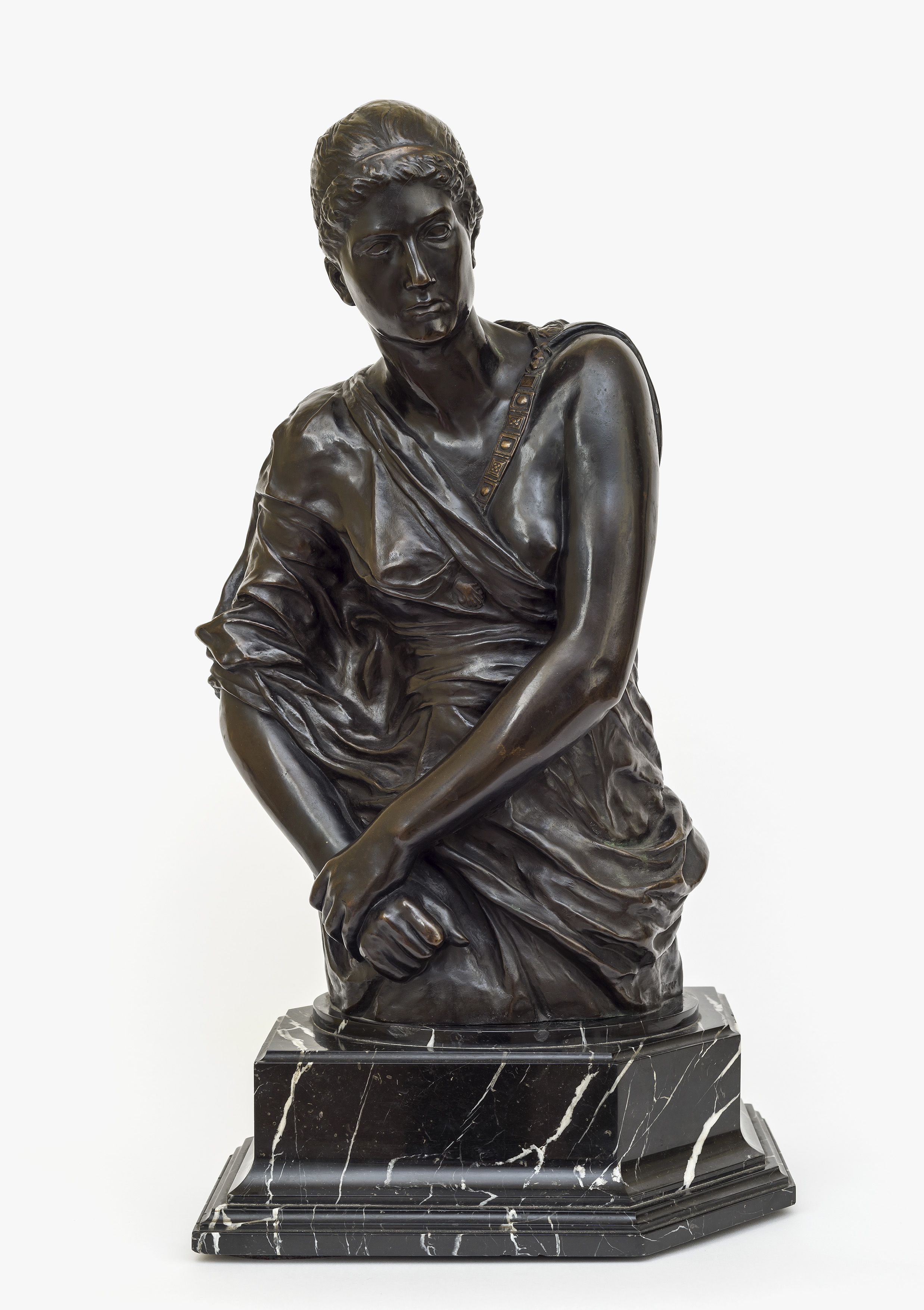 Bronze von Max Klinger